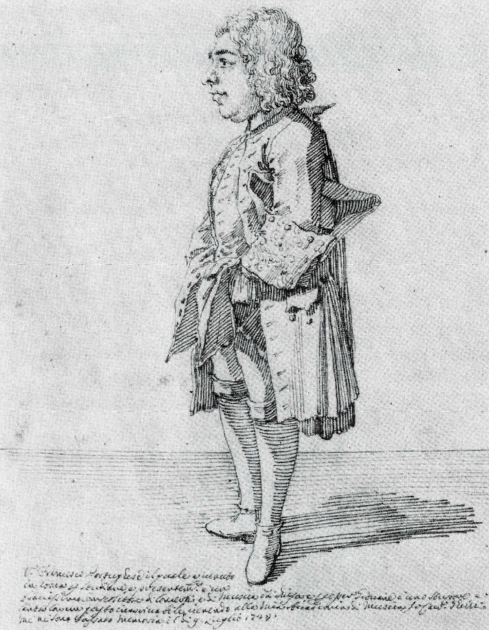 Caricatura del compositor Francisco António de Almeida por Pier Leone Ghezzi